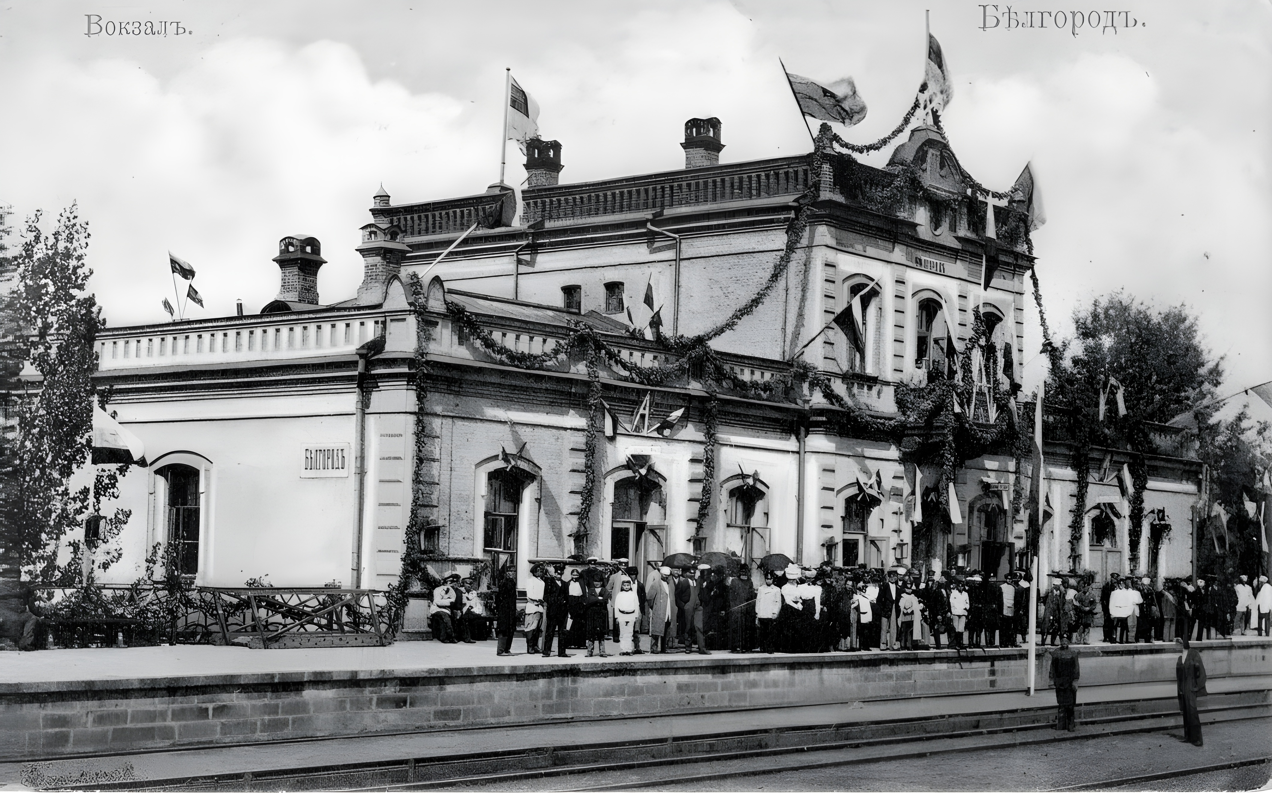 Железнодорожный вокзал старого Белгорода